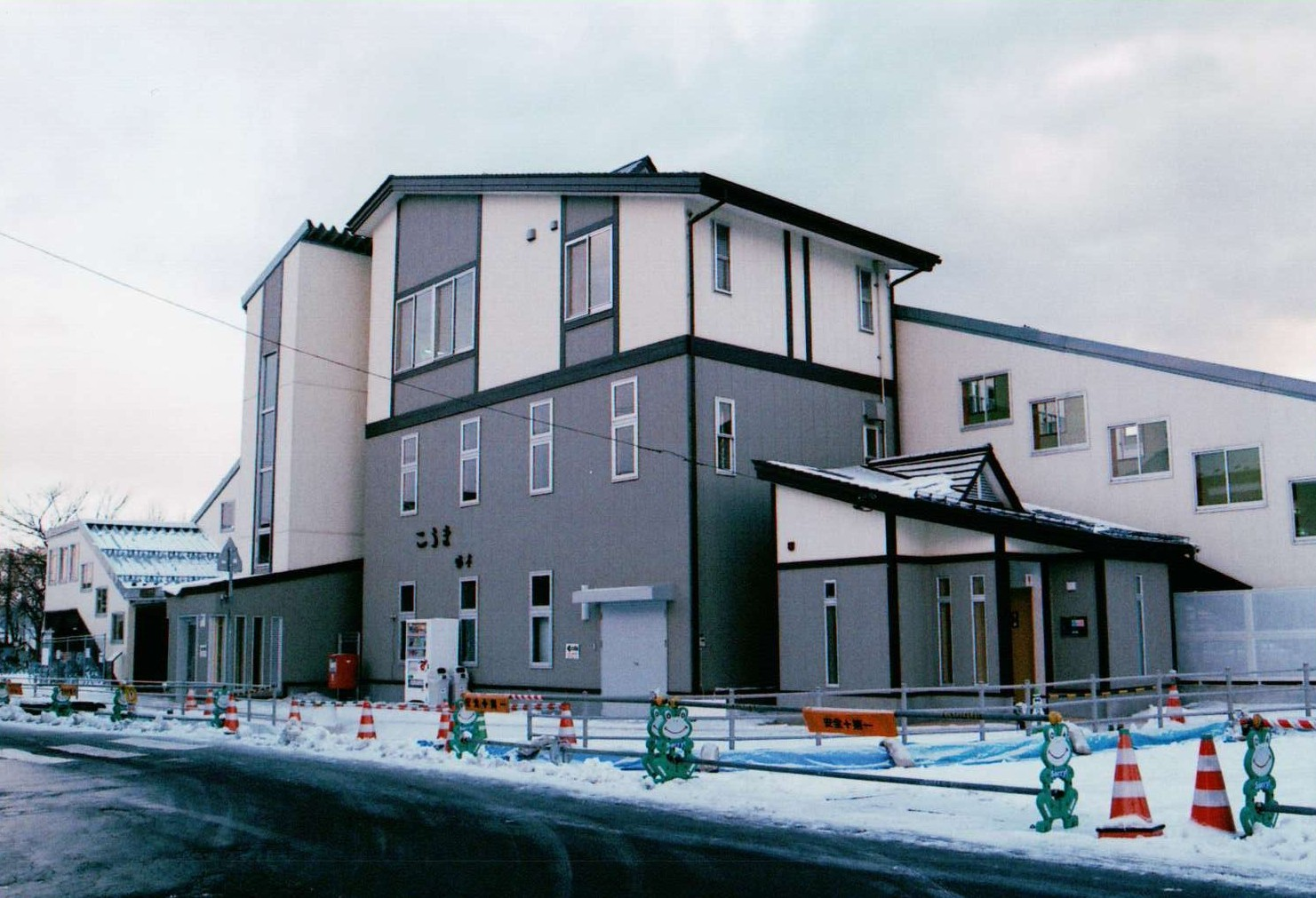 好摩駅(新駅舎)